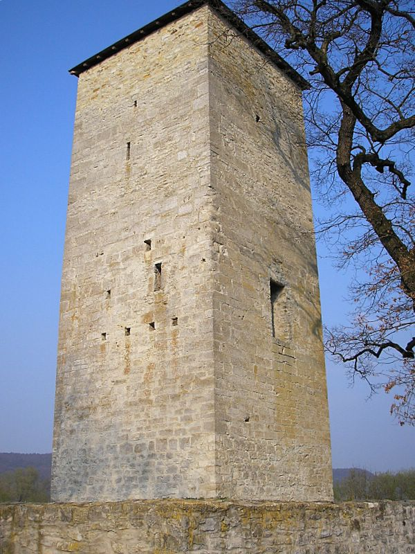 Wasserburg Rieshofen (Gemeinde Walting, Landkreis Eichstätt, Oberbayern). Der Bergfried. Eigene Aufnahme, April 2007 / Water castle Rieshofen near Eichstaett, Upper Bavaria, Germany). The keep (Bergfried). Own photo, April 2007